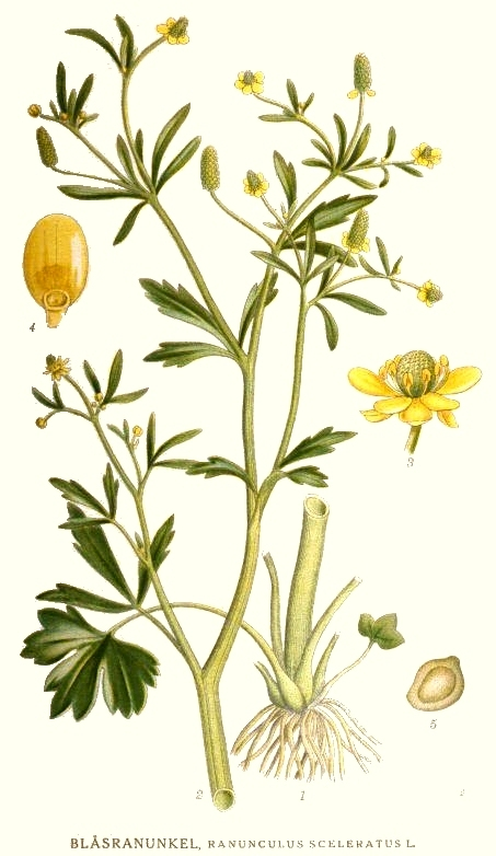 Original Description Bläsranunkel, Ranunculus sceleratus L.